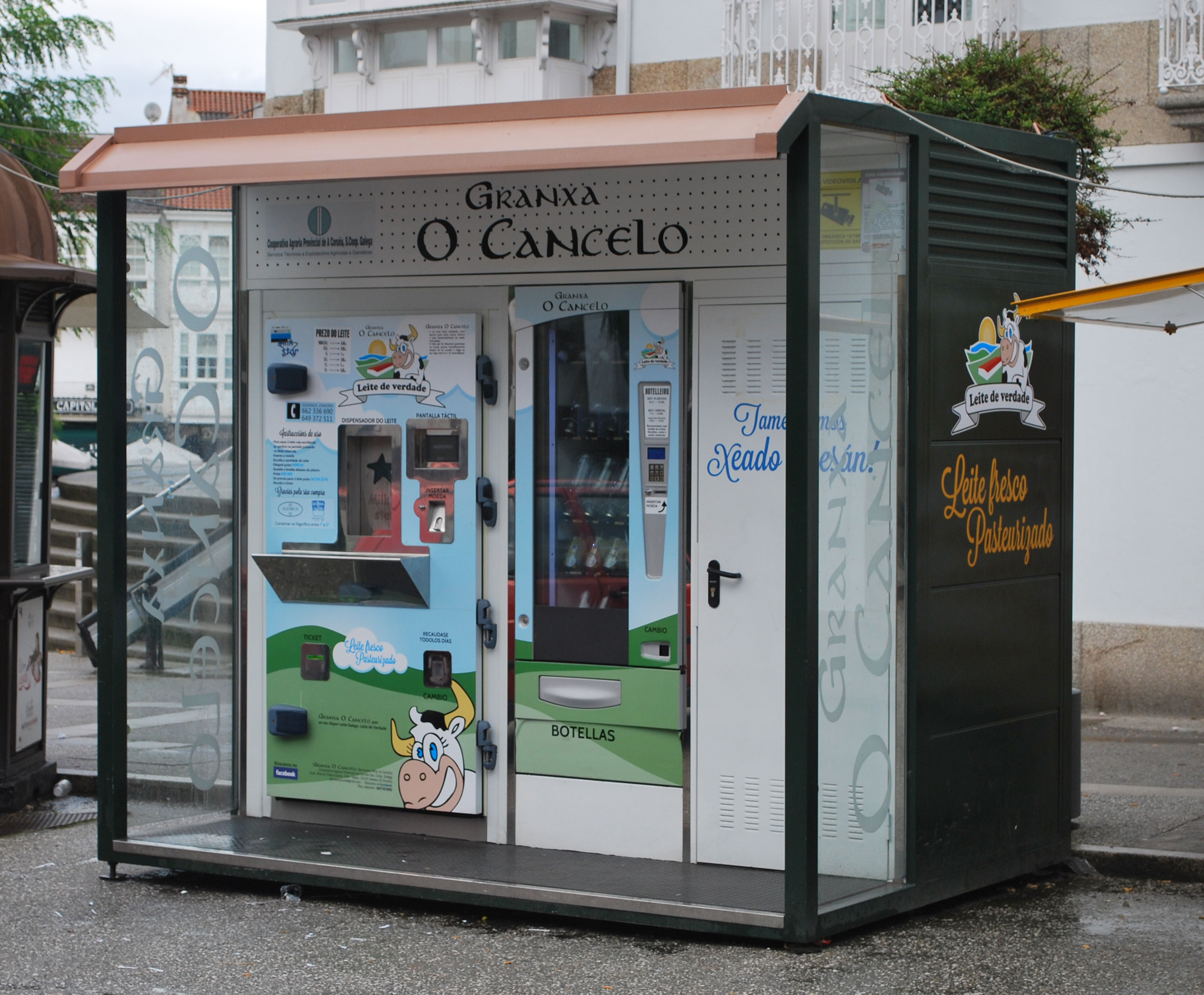 Posto de venda de leite de Granxa O Cancelo en Betanzos A Coruña Galiza